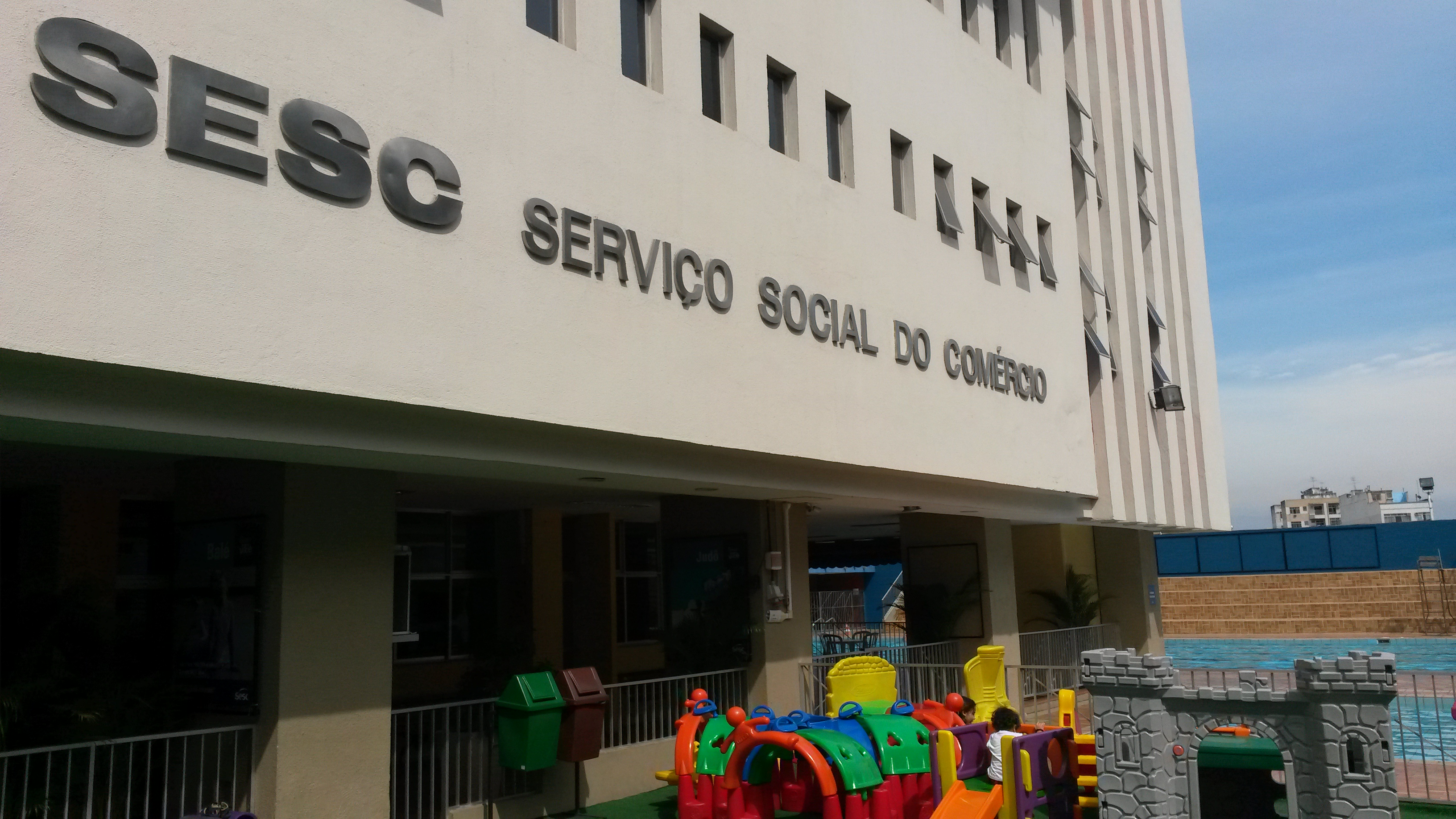 SESC (Serviço Social do Comércio) no bairro de Ramos